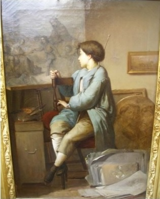 Retrat d' un dels fills de Ramón Martí Alsina